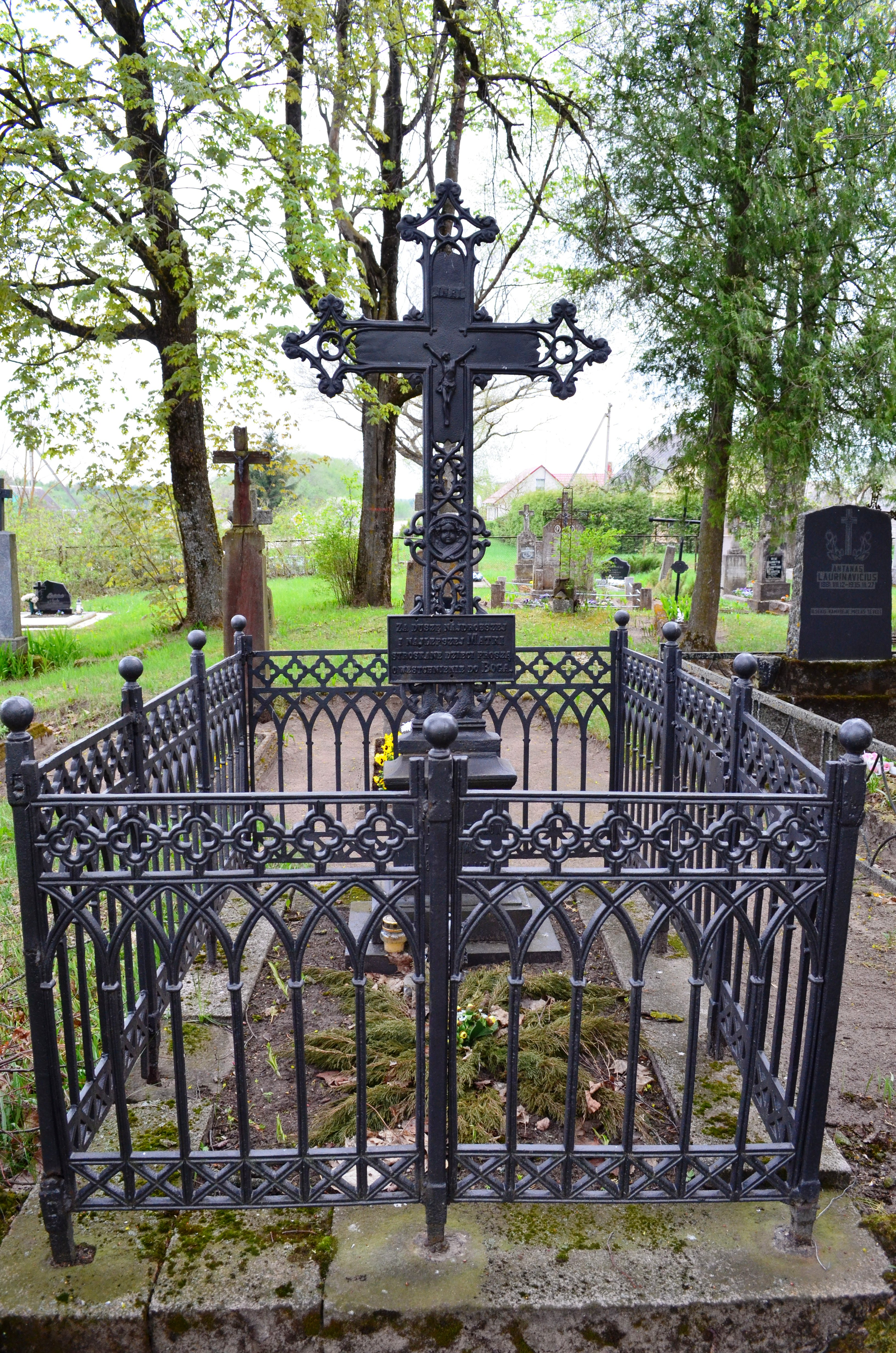 Teodoros Pilsudskos (Teodora z Butlerów Piłsudska) kapas. Pajieslys, Krakių sen., Kėdainių r.